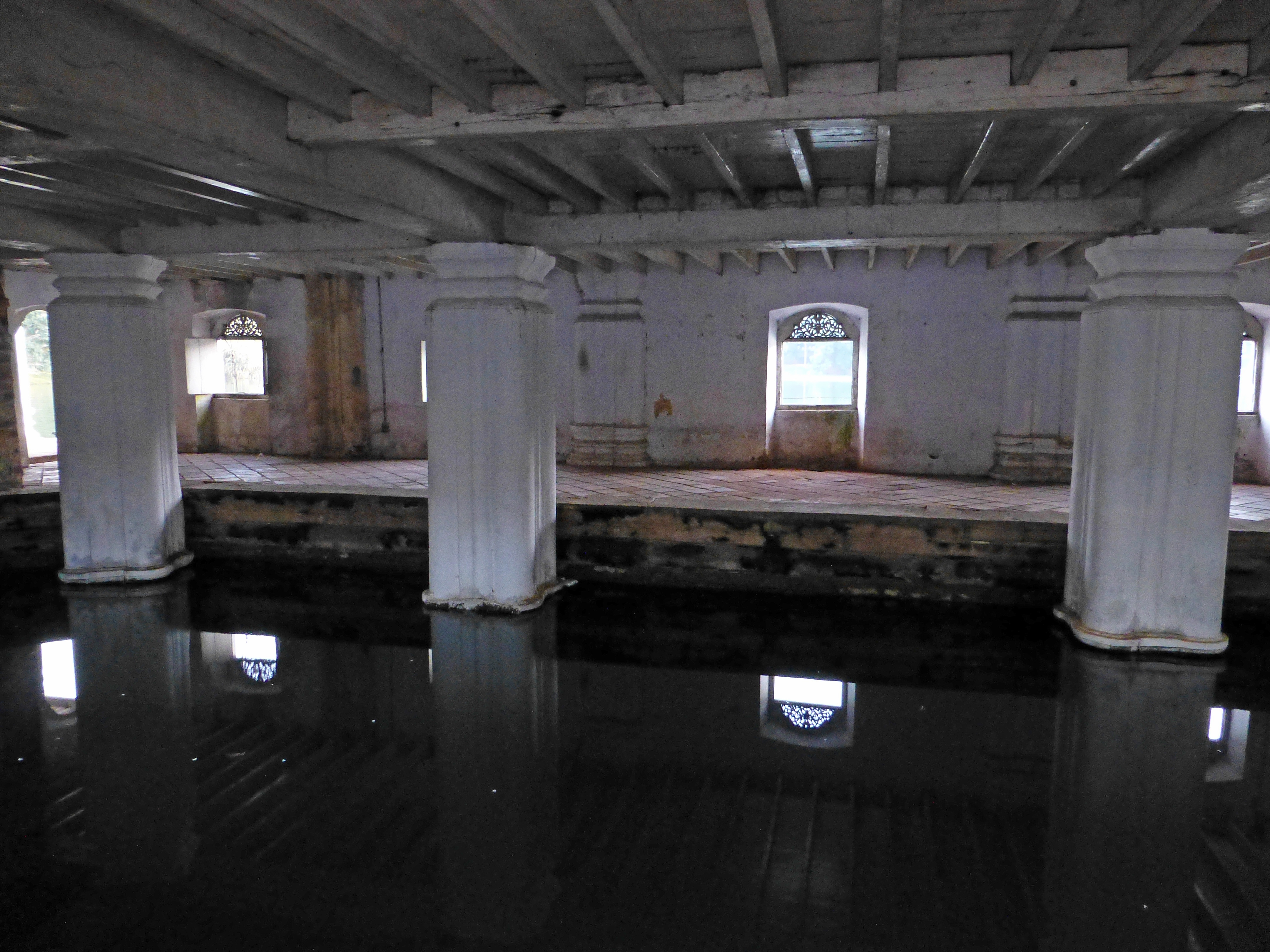 Kandy (Sri Lanka) : anciens bains royaux au bord du lac